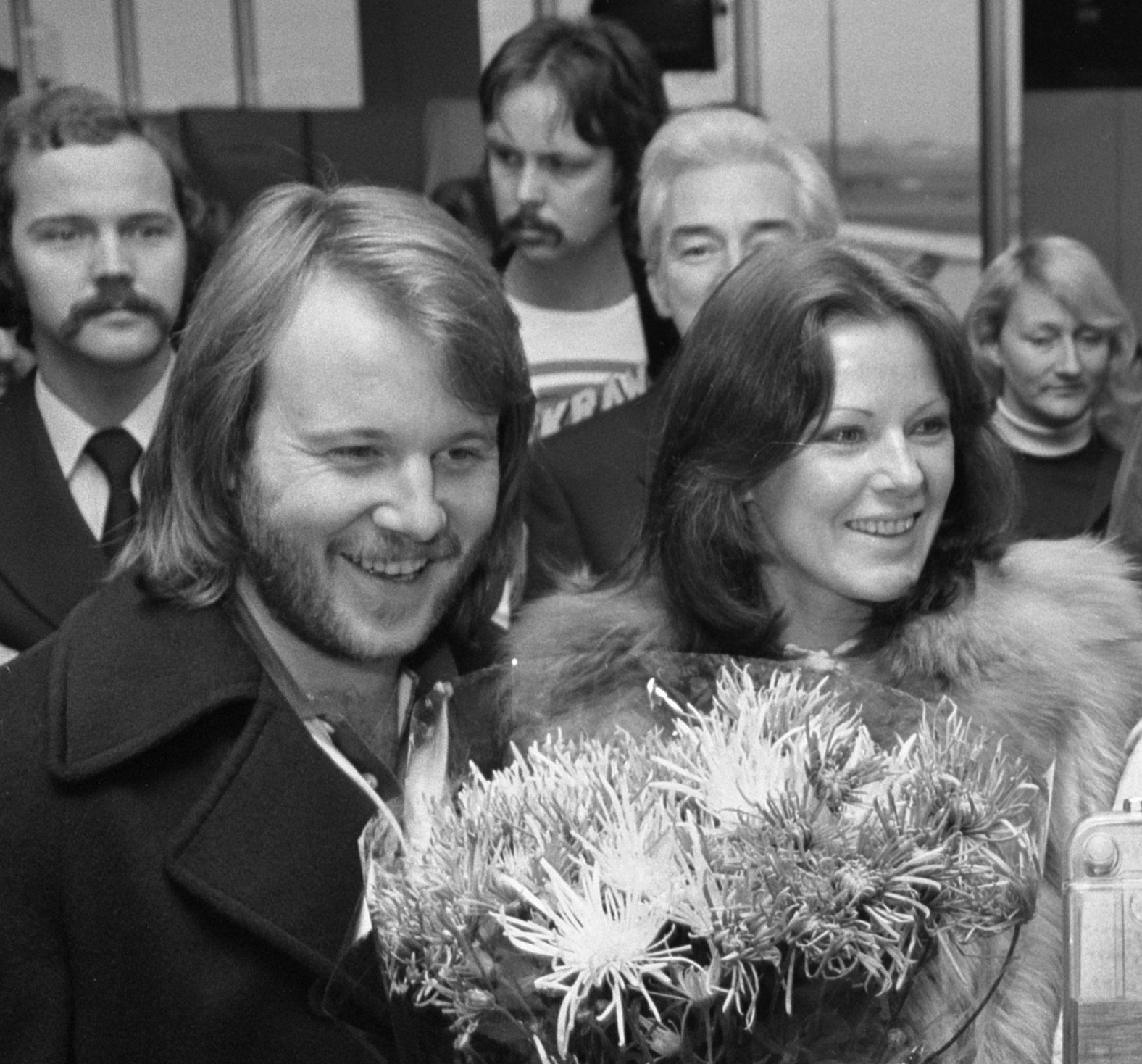 Frida Lyngstad en Benny Andersson in Nederland